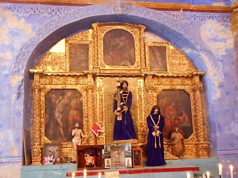 Uno de los retablos de la iglesia convento San Miguel Achiutla